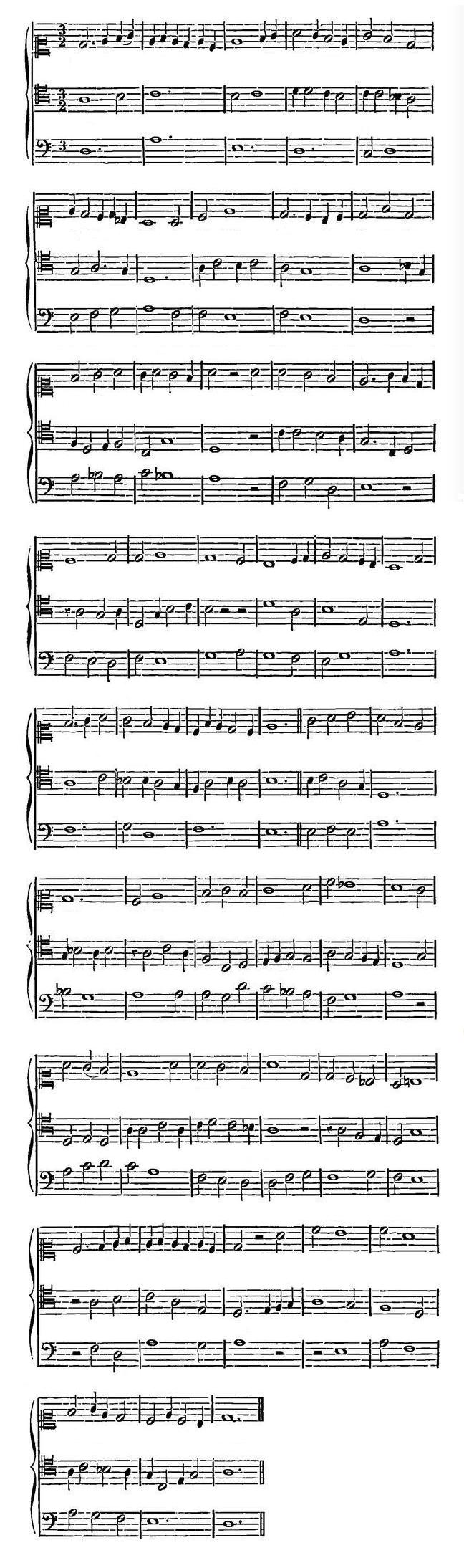 Canzona by Jovannes de Florentia